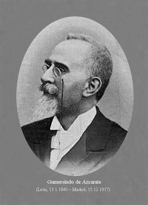 Gumersindo de Azcarate (1840–1917) - rielaborazione della foto di M.Huerta - Madrid, pubblicata in copertina de "La Vida Marittima" del 20.2.1903 pag. 1